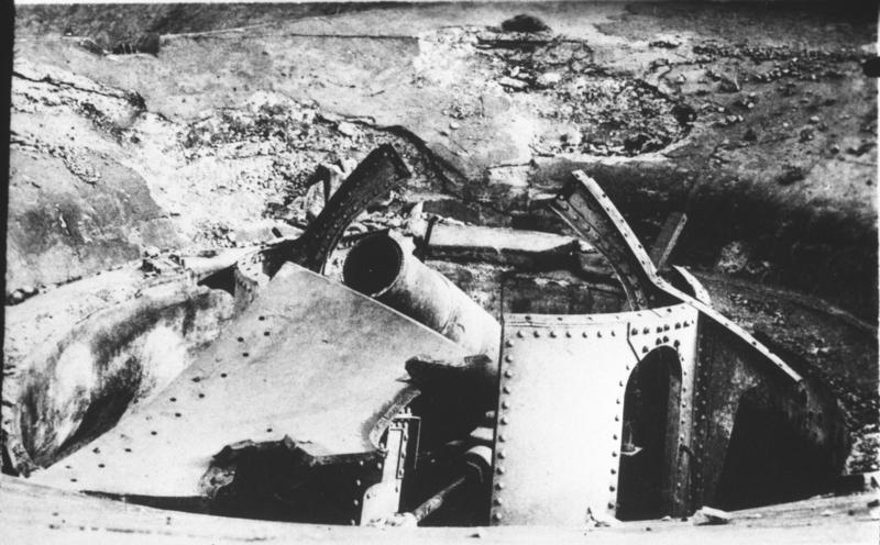 Schutzgebiet Kiautschou 1.Weltkrieg Gesprengtes Geschütz auf dem Bismarck-Berg